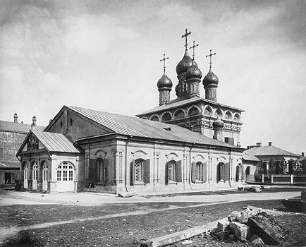 Church of Kosma and Damian in KadashiМосква, Замоскворечье. Безср. Космы и Дамiана, что въ Кадашахъ, на ПолянкЪ. - Пр. 4: Рождества Бгр., Космы и Дамiана, Николая Чуд. и Прп. Сергiя. - Зн. въ 1625 г. (въ 1686 г. каменная).